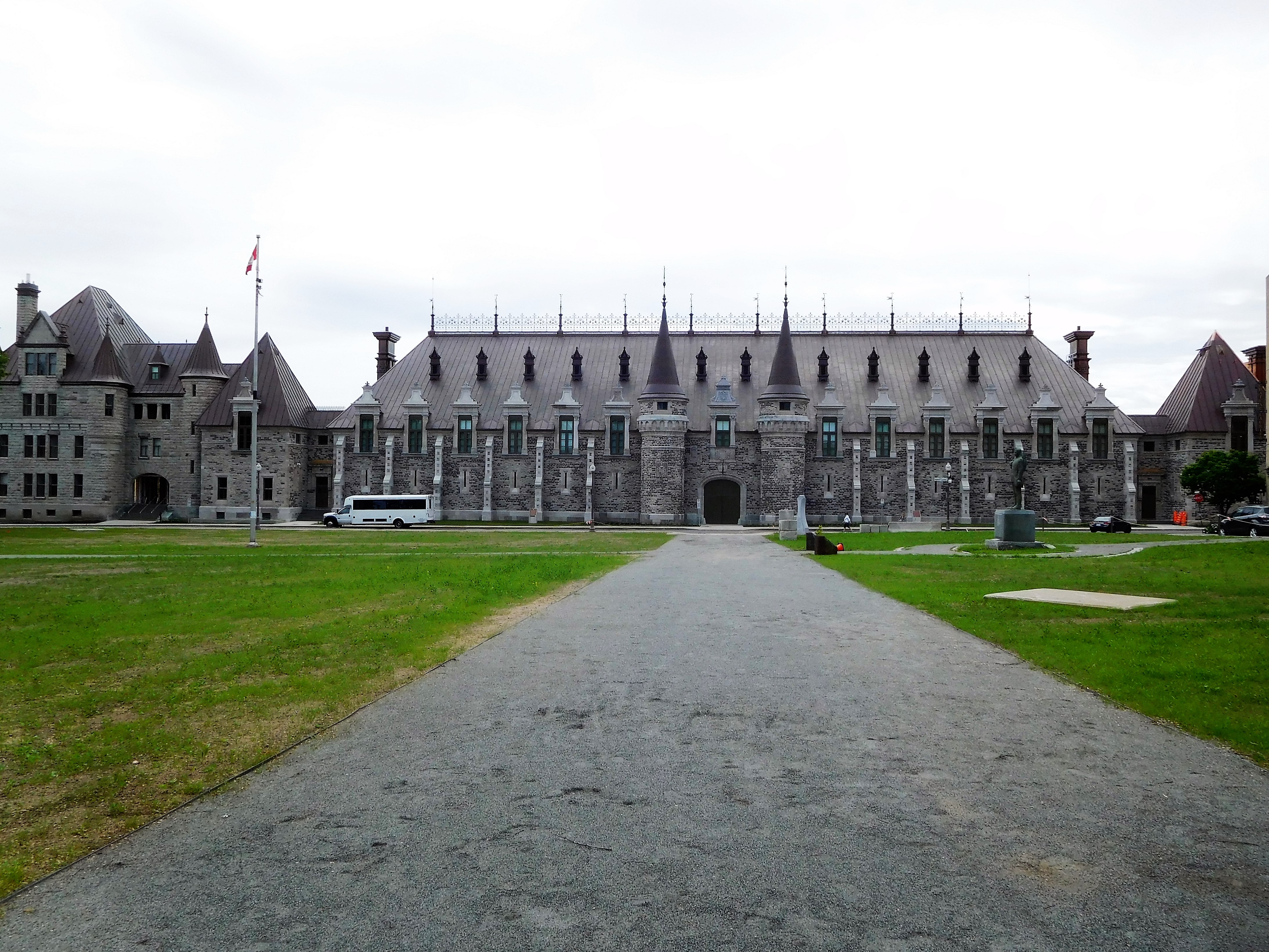 Manège militaire Voltigeurs de Québec, 805, avenue Wilfrid-Laurier, Québec